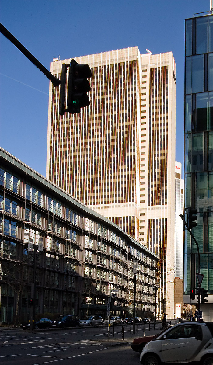 Das FBC Frankfurter Büro Center von Westen mit Mainzer Landstraße